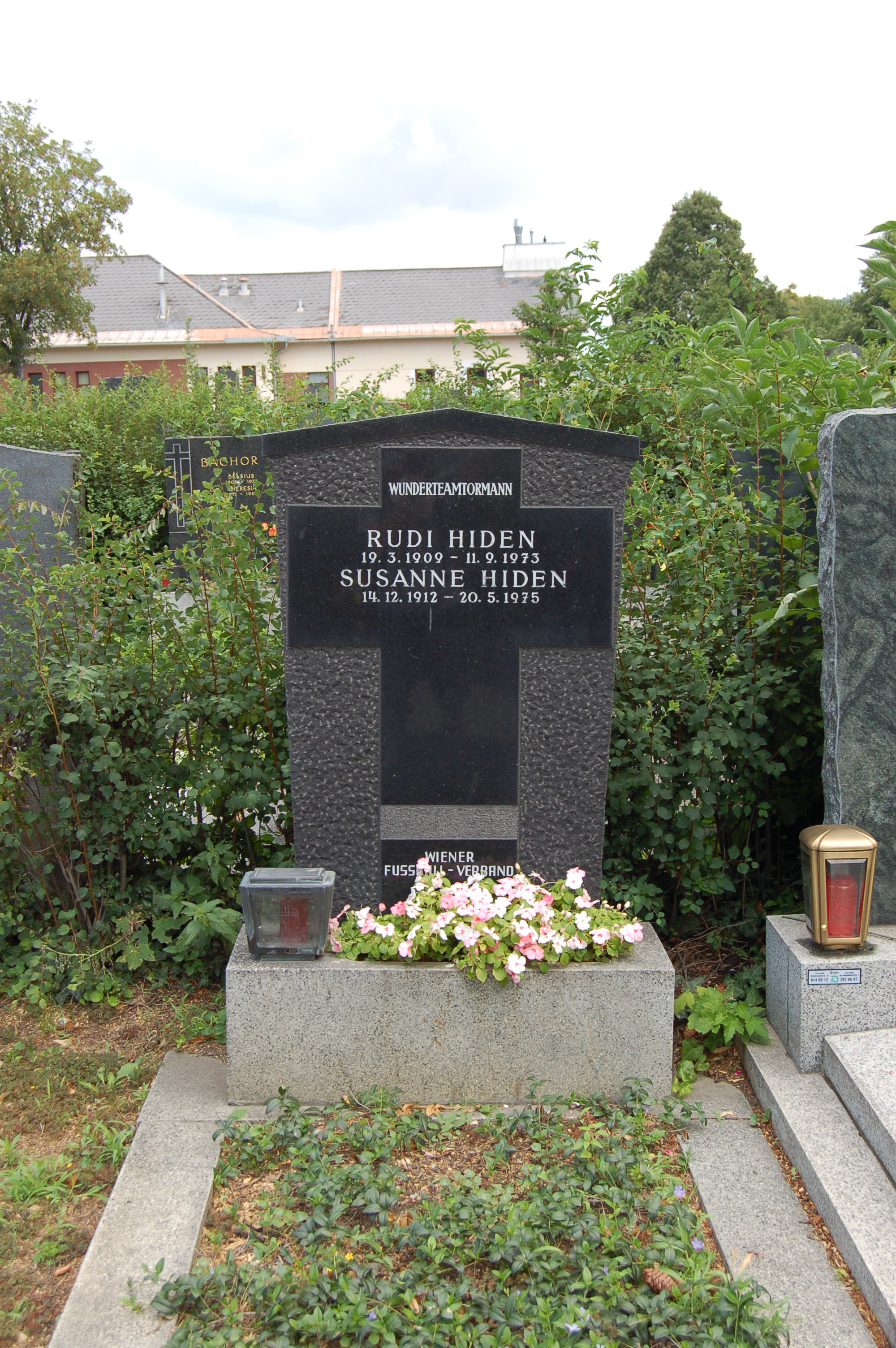 Stammersdorfer Zentralfriedhof, Grab von Rudolf Hiden, Fußballspieler